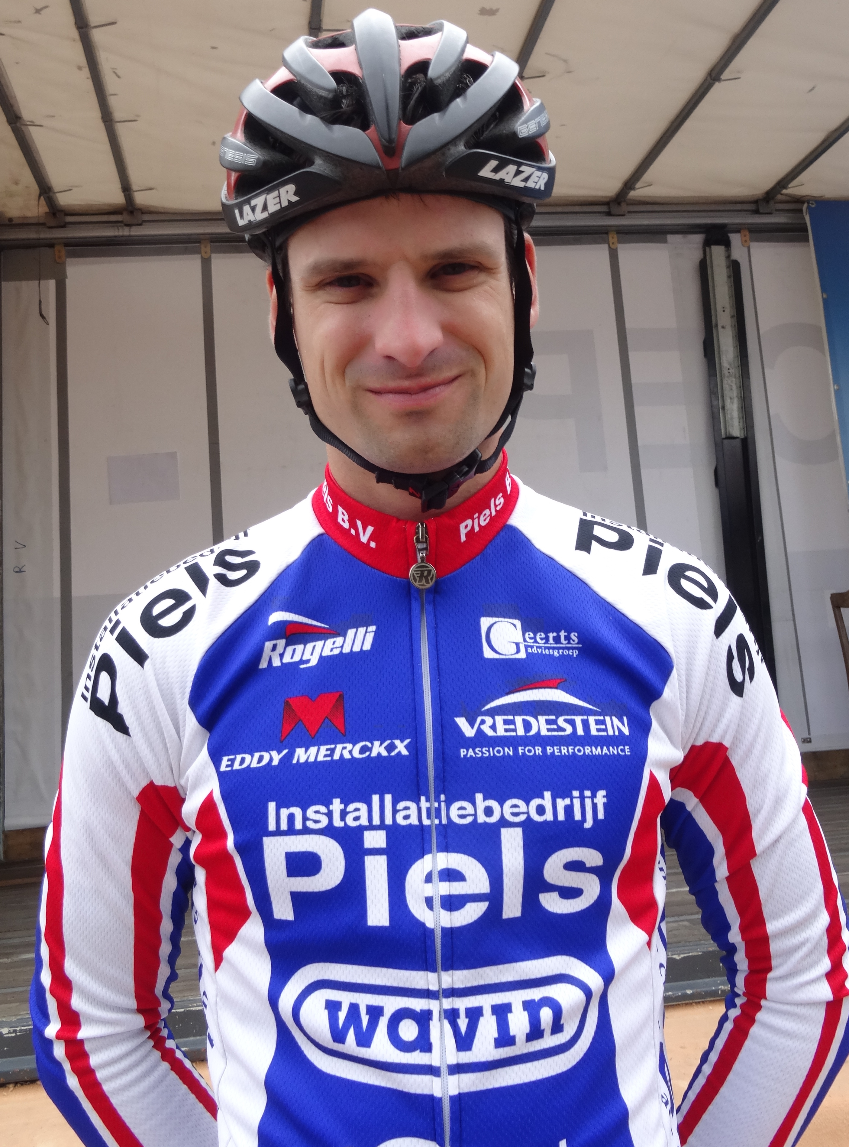 Reportage photographique réalisé le mercredi 27 août à l'occasion du départ de la Druivenkoers Overijse 2014 à Huldenberg, Belgique.